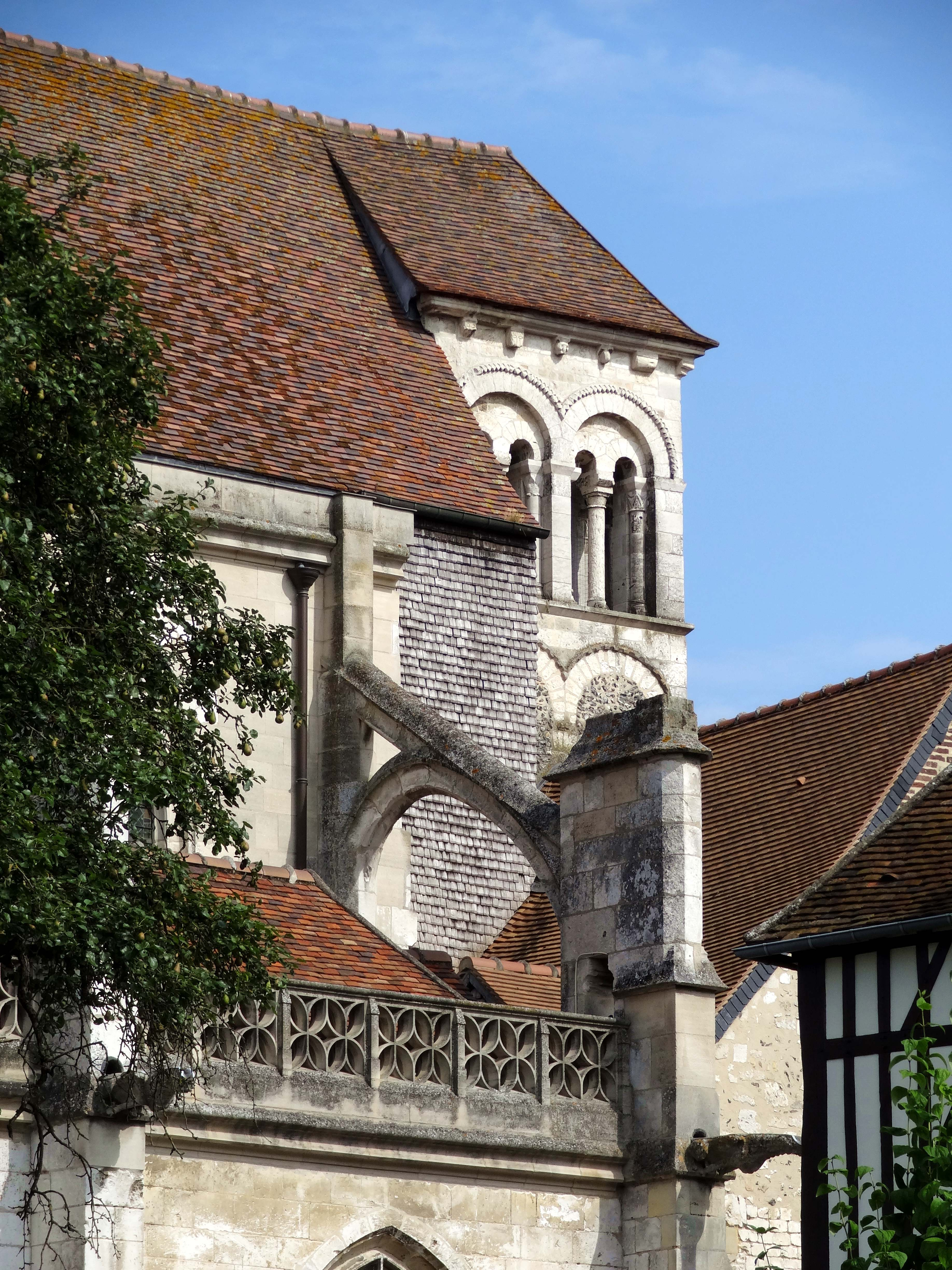 Église Notre-Dame de Marissel - voir titre.